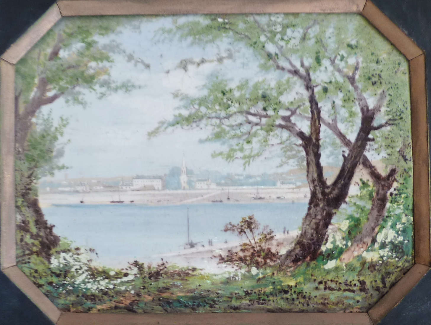 Alfred Beau : Bénodet vu de Sainte-Marine ( peinture sur émail, manufacture Porquier, manoir de Kerazan en Loctudy, fondation Astor)